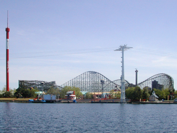 La Spirale (à gauche) et le Monstre